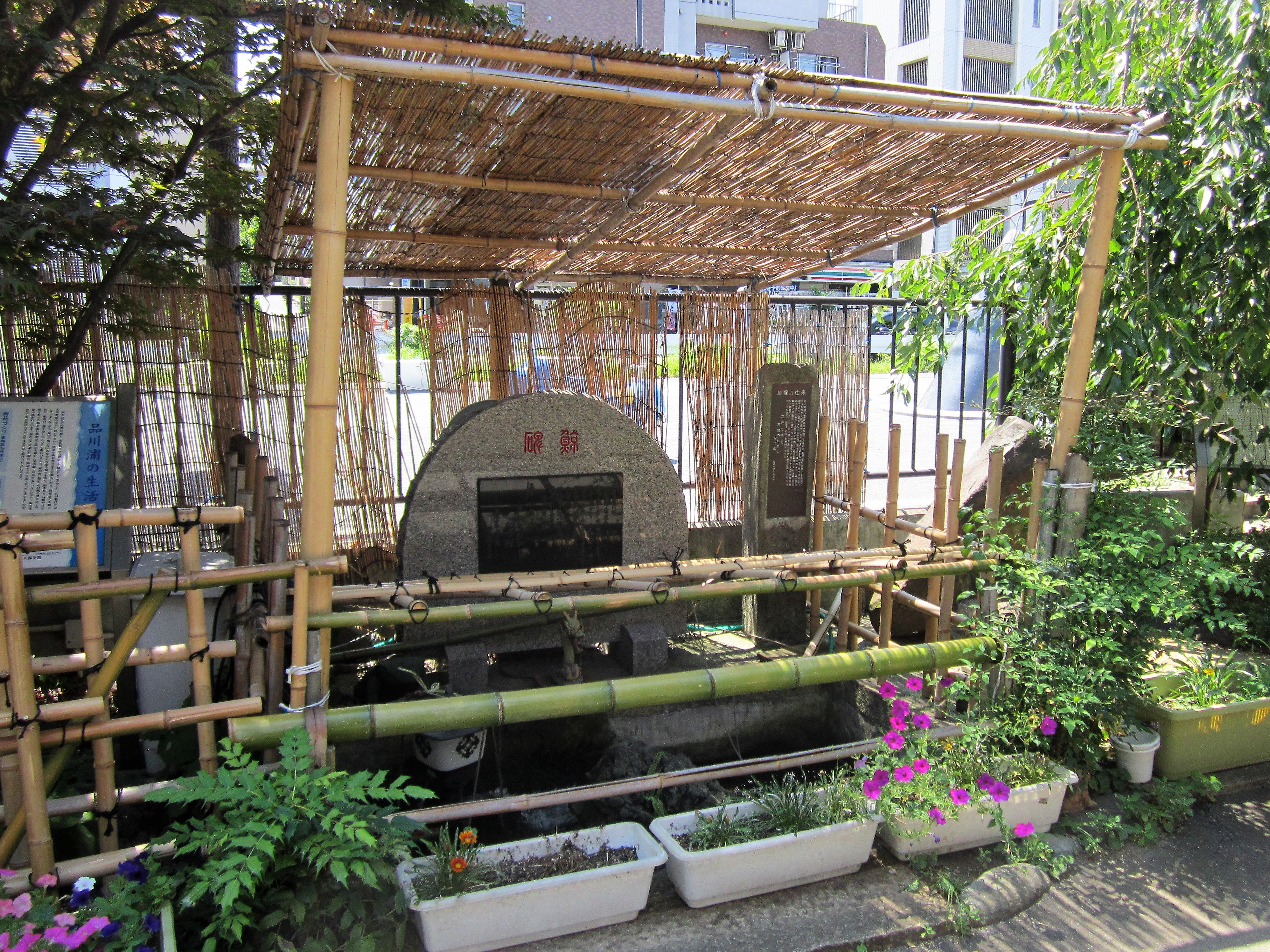 利田神社の鯨塚（品川区東品川）